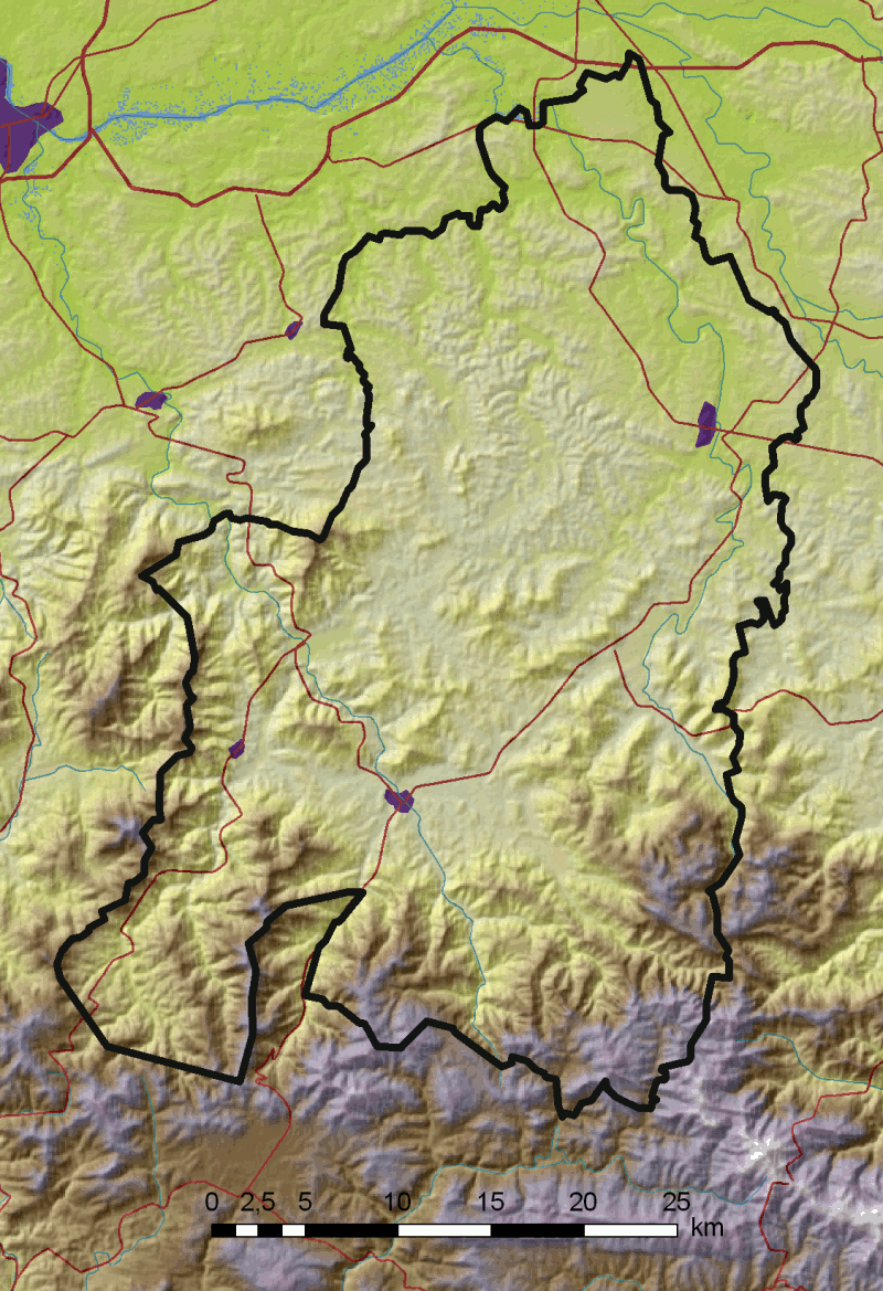 Nafarroa Behereko mapa fisikoa